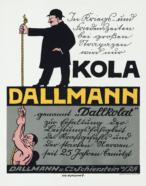 Plakat im Vielfarbdruck in den Maßen 56,1 x 43,8 cm der Kunstdruckerei Künstlerbund Karlsruhe aus dem Jahr 1914, nach einem Entwurf von Ivo Puhonny für die Firma Dallmann & Co. in Schierstein am Rhein (heute ein Stadtteil von Wiesbaden). Zu sehen ist ein Mann mit Hut, der mit nur einem Arm ein Seil hält, das ein durchtrainierter, am Seil sogar hängender Sportler nicht mit aller Kraft herunterziehen kann. Der Text auf dem Plakat lautet: „In Kriegs- und Friedenszeiten bei großen Strapazen wird nur Kola Dallmann, genannt „Dallkolat“ zur Erhaltung der Leistungsfähigkeit des Kraftgefühls und der starken Nerven seit 25 Jahren benützt“